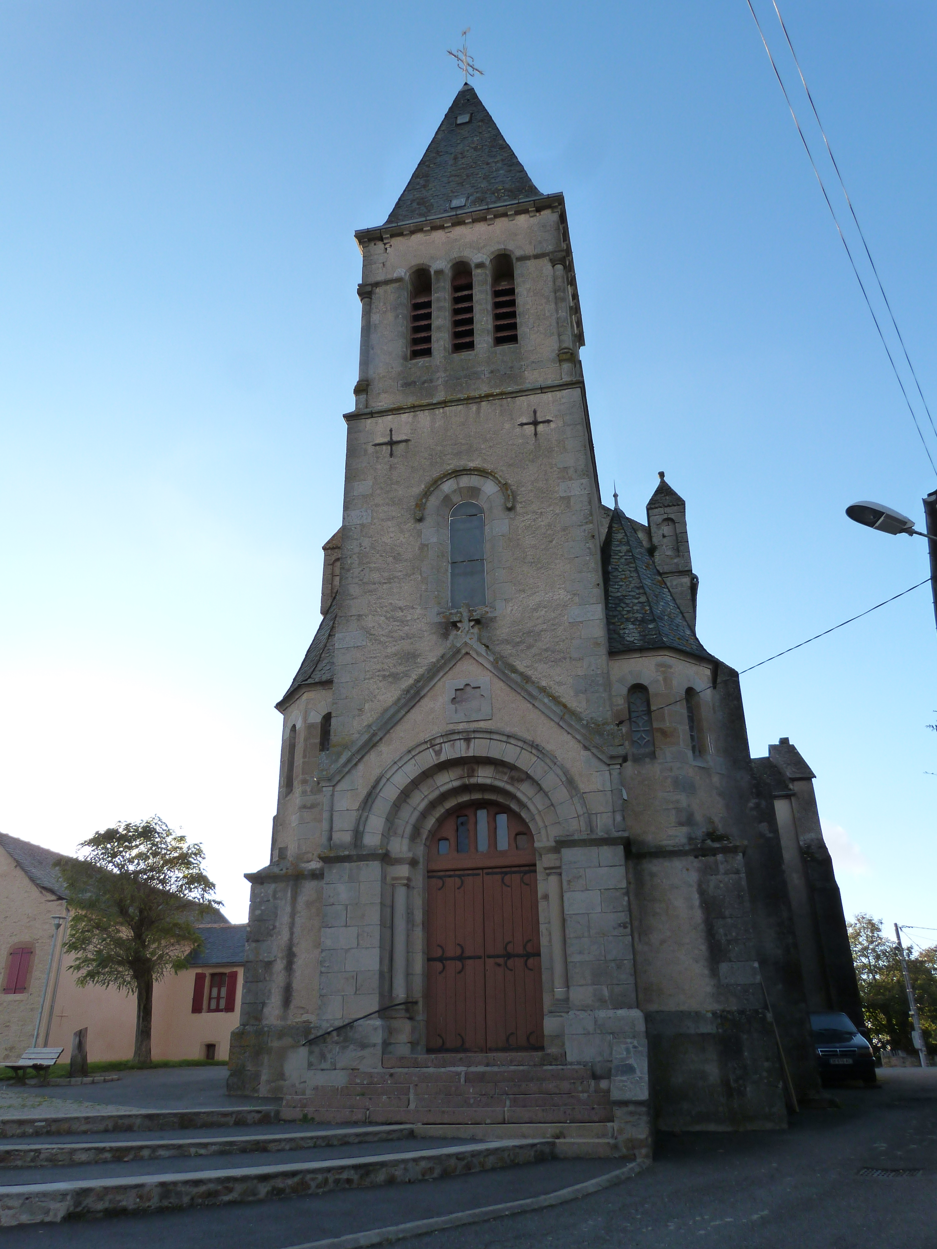 Eglise Saint-Jean-Baptiste de Taytac